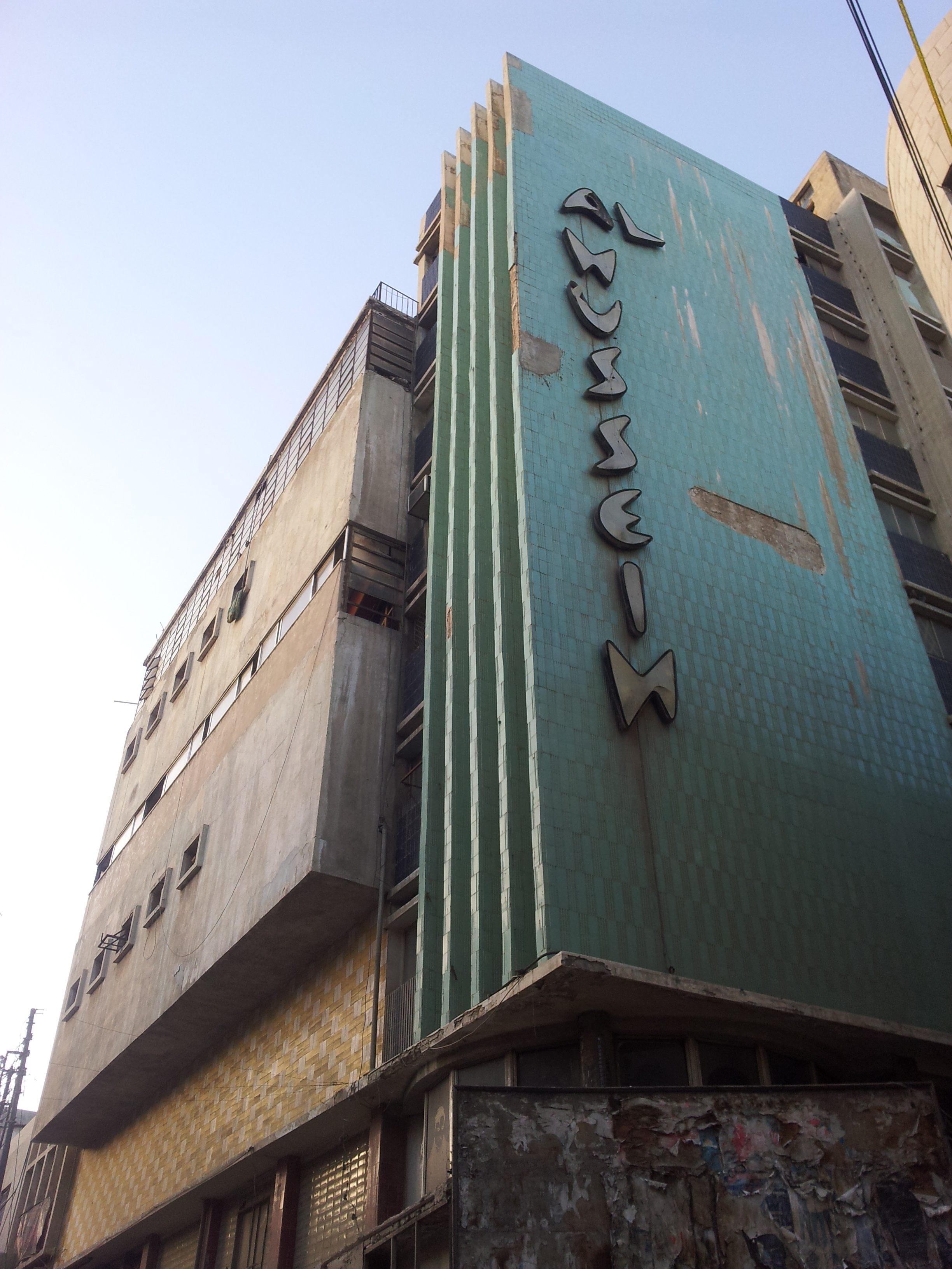 سينما الحسين في العاصمة الأردنية عمان، والتي أُنشئت في عام 1958، وفتحت أبوابها للعمل في 18 ديسمبر (كانون الأول) 1960.